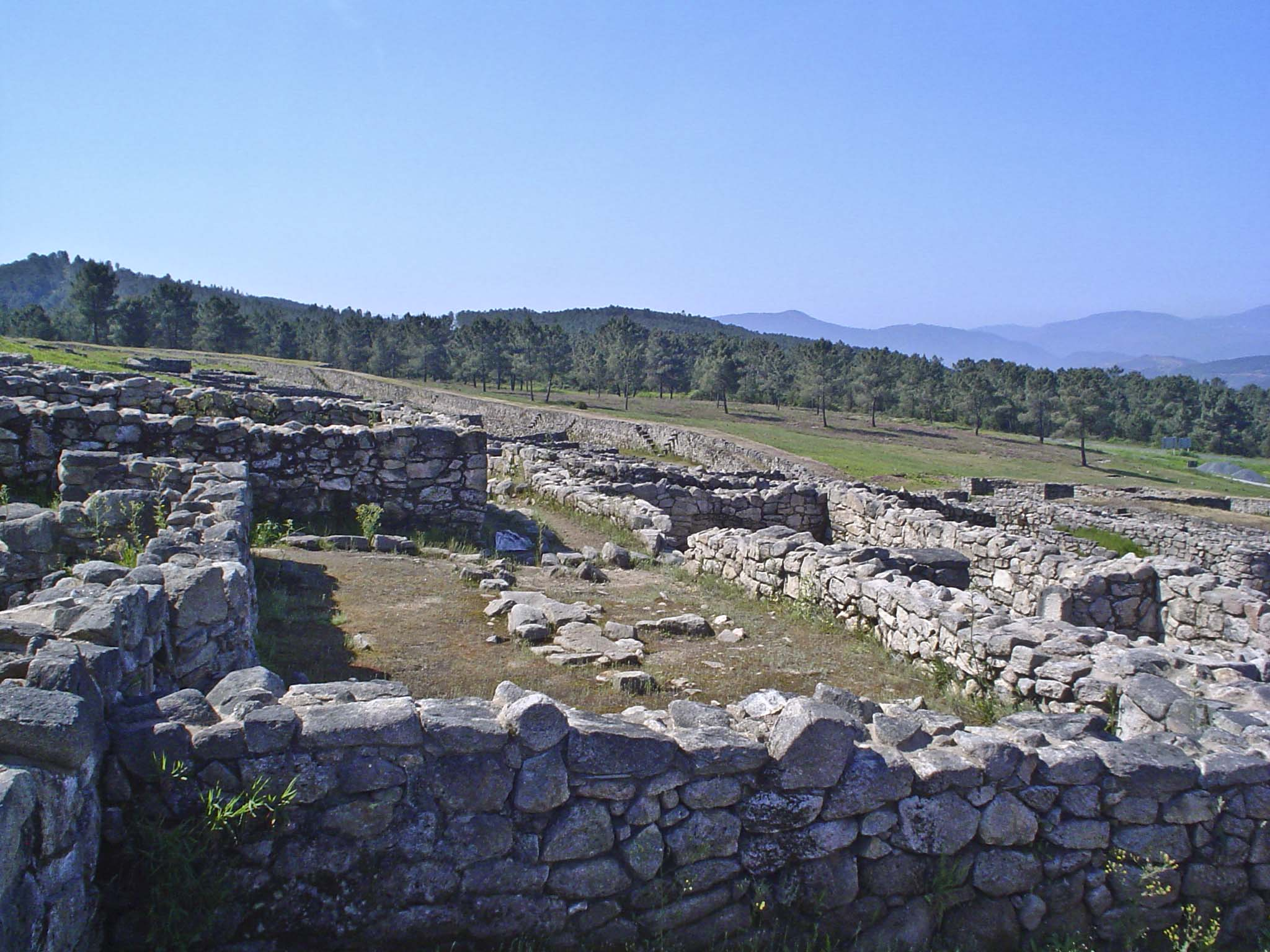 Barrio oeste, detalle lado sur del Castro de San Cibrao de Las